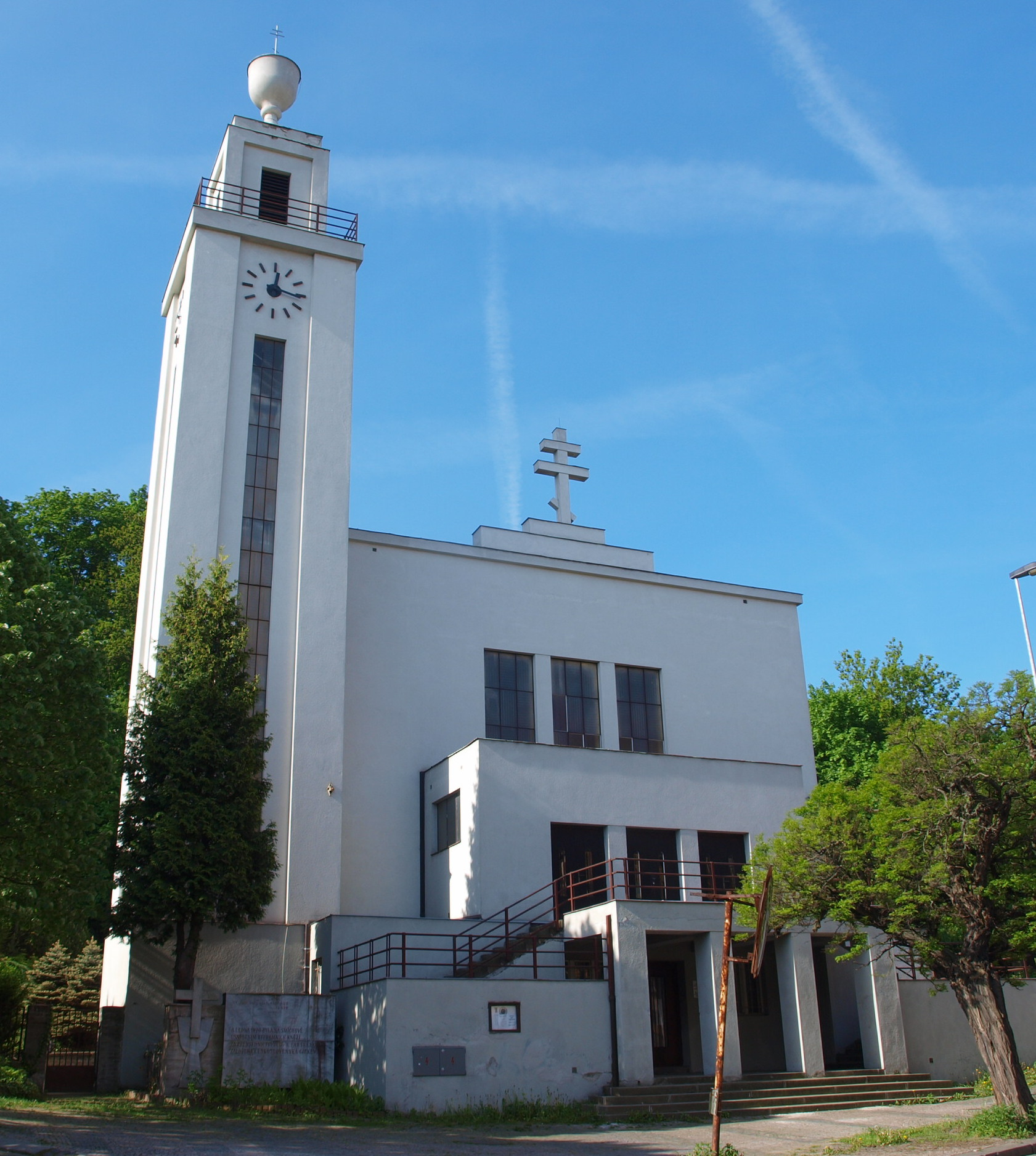 Husův sbor, Praha-Smíchov (Santoška)